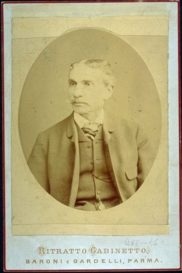 Gaetano Mastellari